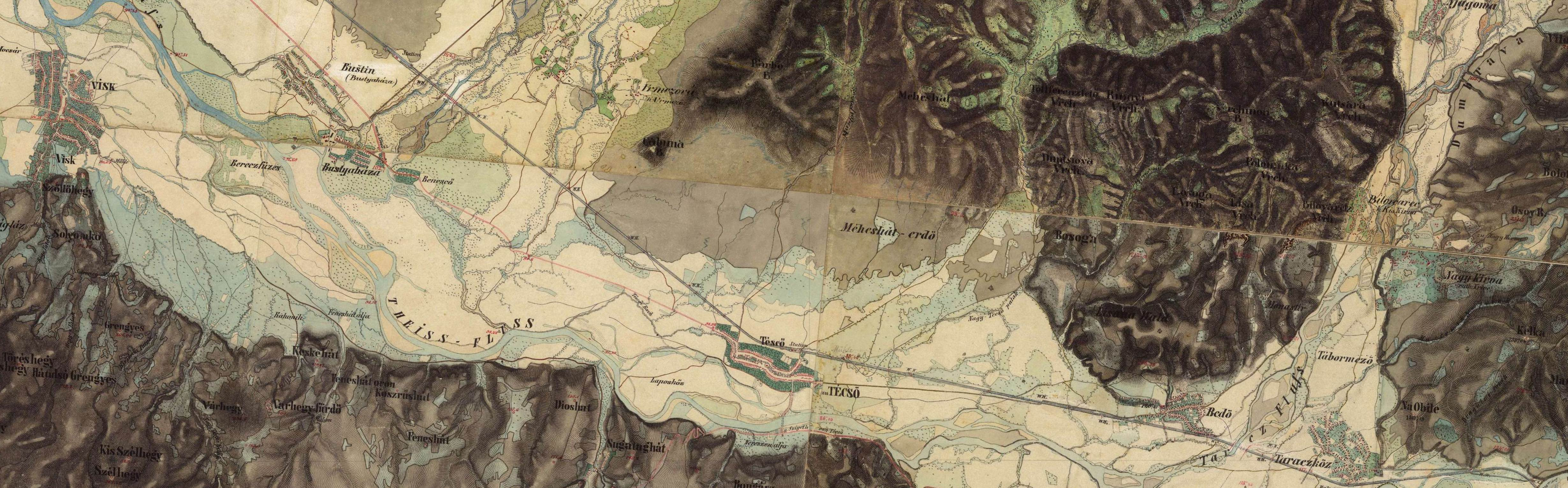 Скопійовано з сайта